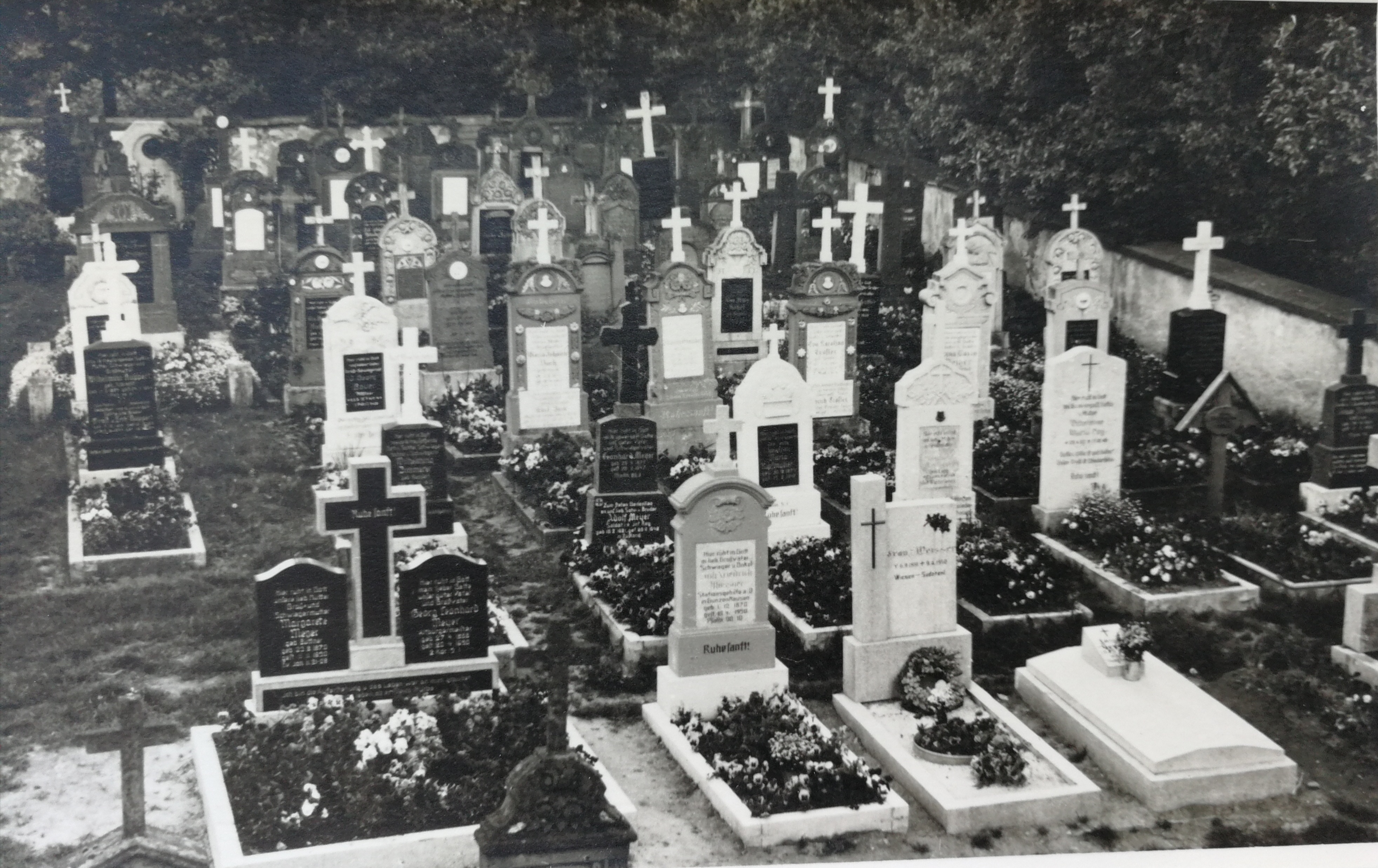 Friedhof Sammenheim Mai 1951 rechte Seite